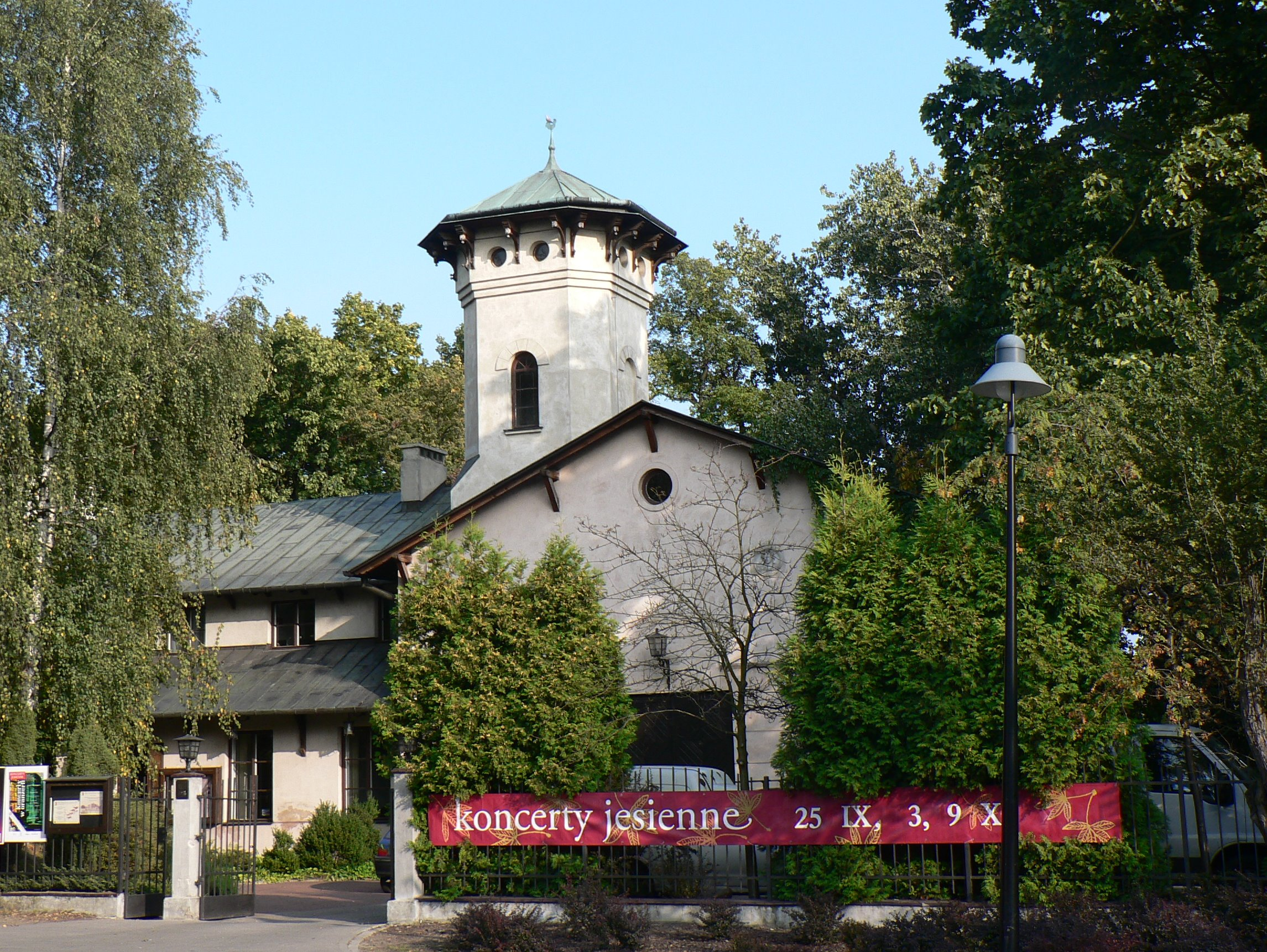 Muzeum Hutnictwa w Pruszkowie